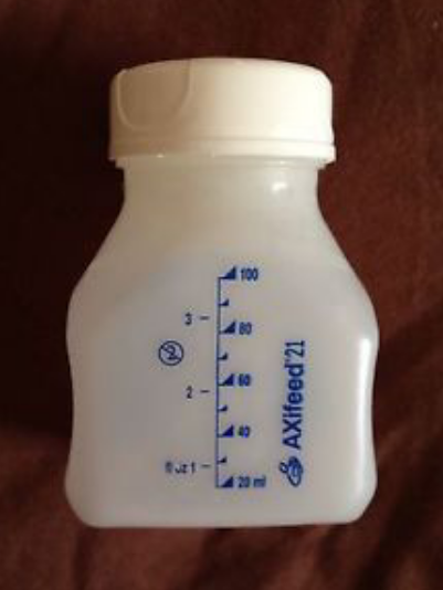 Imagen de una botellita concebida especialmente para el almacenamiento de leche materna en un banco de leche ("milk bank" de los anglosajones). La botella es manufacturada por la empresa britanica Axifeed.